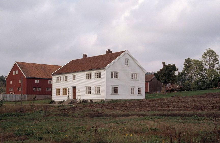 Vestre Moland prestegård. Foto: E.R. Fra Riksantikvarens Kulturminnesøk.